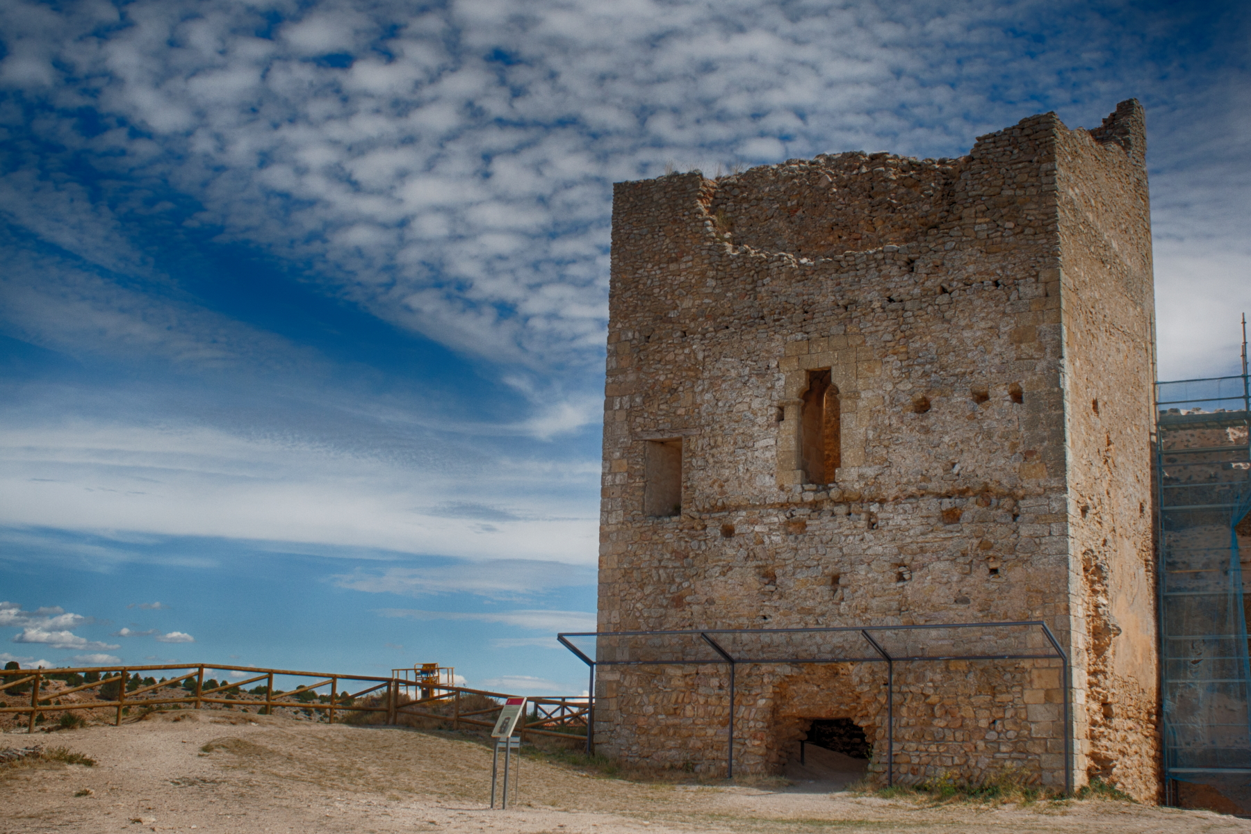 Castillo, siglo XIV o XV Calatañazor Provincia de Soria Castilla y León España